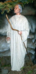 Figure réaliste de Colomban de Luxeuil, moine irlandais du VIè siècle, au musée de Navan. Cette représentation réaliste est typique du moine celtique irlandais avec sa robe blanche, sa canne de pasteur et sa tonsure dégageant la partie antérieure du crâne. Colomban a souvent été décrit comme un homme de forte stature. Moine voyageur, il lui fallut une constitution robuste et vigoureuse pour parcourir à pied les chemins de l'Europe.